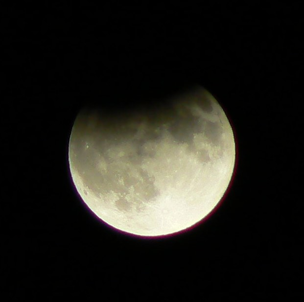 Maximal phase of the partial Lunar eclipse - 7 September 2006 - Sofia, Bulgaria. Максимална фаза на частичното лунно затъмнение - 7 септември 2006 - София, България.